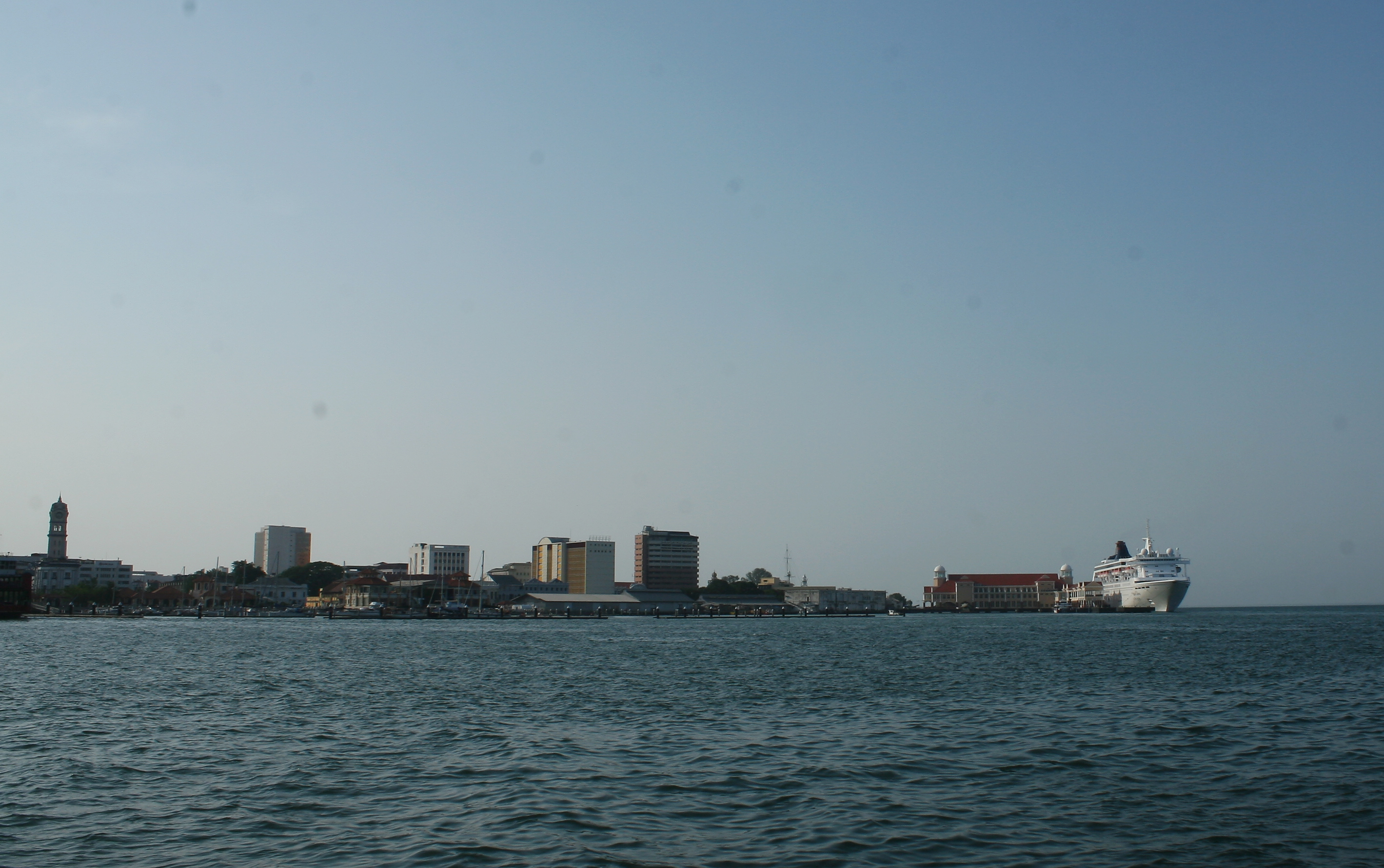 PULAU PINANG